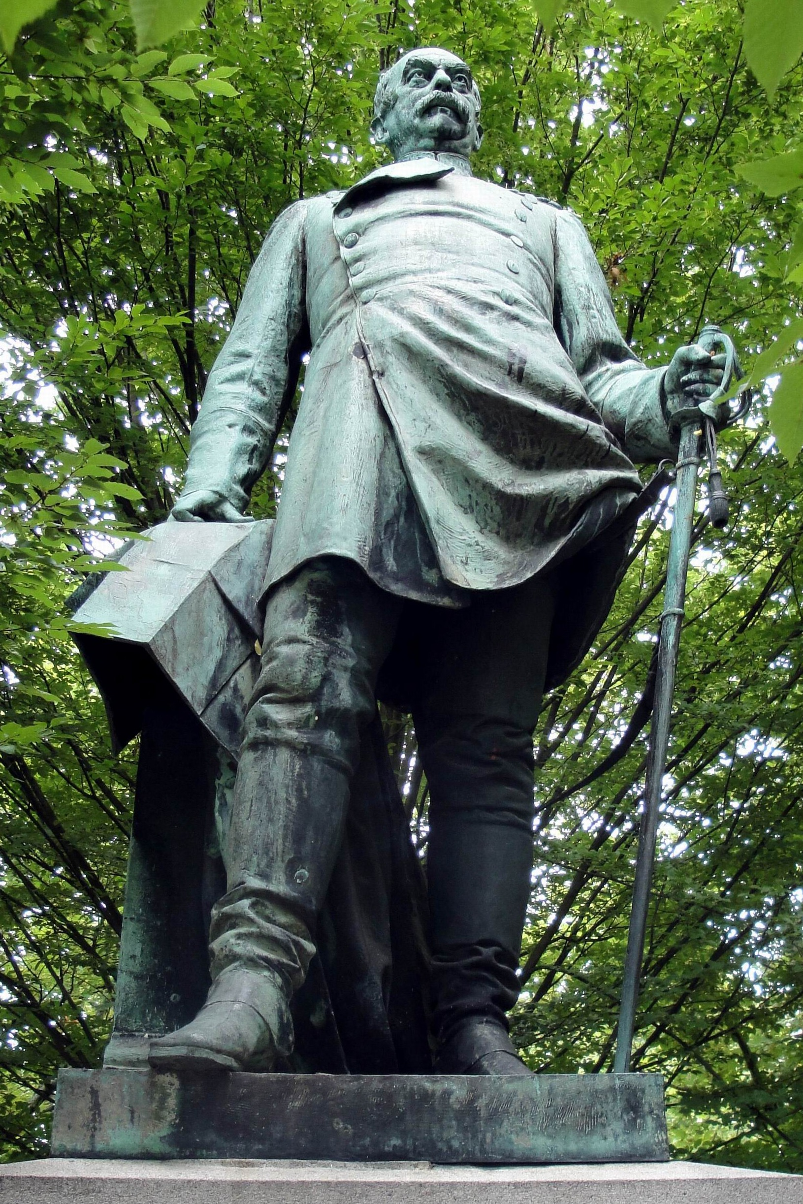 Bismarckstatue vor dem Bismarck-Gymnasium in Karlsruhe